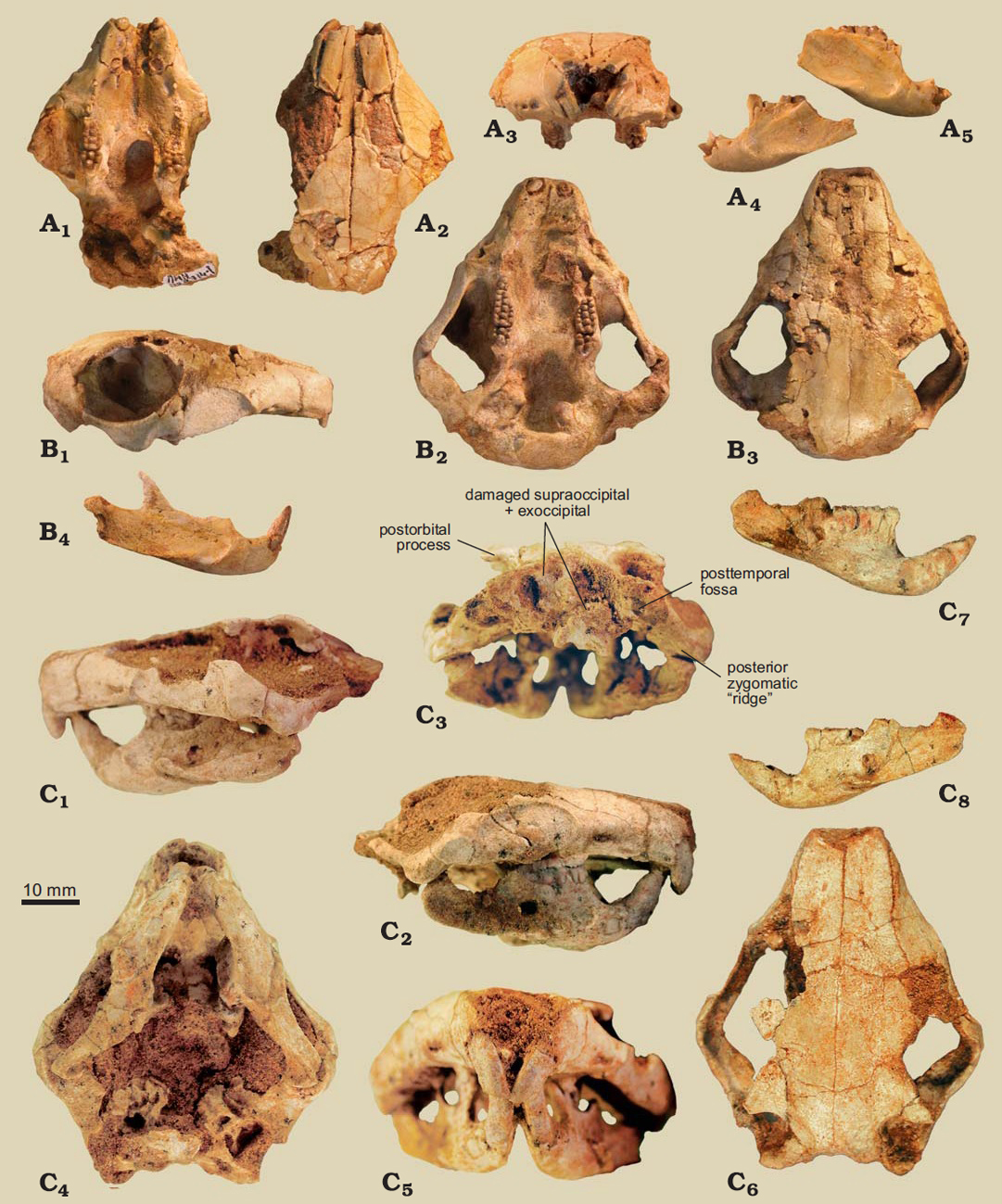 Catopsbaatar catopsaloides. Three skulls and dentaries from Hermiin Tsav, Gobi Desert, Mongolia, ?upper Campanian, showing size variation related to the age of individuals.PM120/107 is from Hermiin Tsav I; detailed localization of PIN 4537/4 and PIN 4537/5 is not known. A. PIN 4537/4, incomplete skull of juvenile individual, zygomatic arches and posteriormost part not preserved, in ventral (A1), dorsal (A2), and anterior (A3) views; incomplete left dentary of the same in lateral view (A4), and incomplete right dentary of the same in lateral view (A5). B. PIN 4537/5, almost complete skull of juvenile individual in right lateral (B1), ventral (B2), and dorsal (B3) views; the right dentary of the same in lateral view (B4). C. PM120/107, almost complete skull associated with both dentaries of adult individual in left lateral (C1), right lateral (C2), occipital (C3), ventral (C4), and anterior (C5) views; isolated skull of the same in dorsal view (C6); left dentary of the same in medial (C7) and lateral (C8) views. All in the same scale. Note the tripartite infraorbital foramen (right side of PIN 4537/4, A3); double (right side of PIN 4537/5, B1, B2); and single (both sides of PM 120/107, C1, C2, C5). The structures seen in C3 are explained. For explanation of structures in other figures, see Figs. 2–4, 9, and reconstructions in Figs. 6–8.